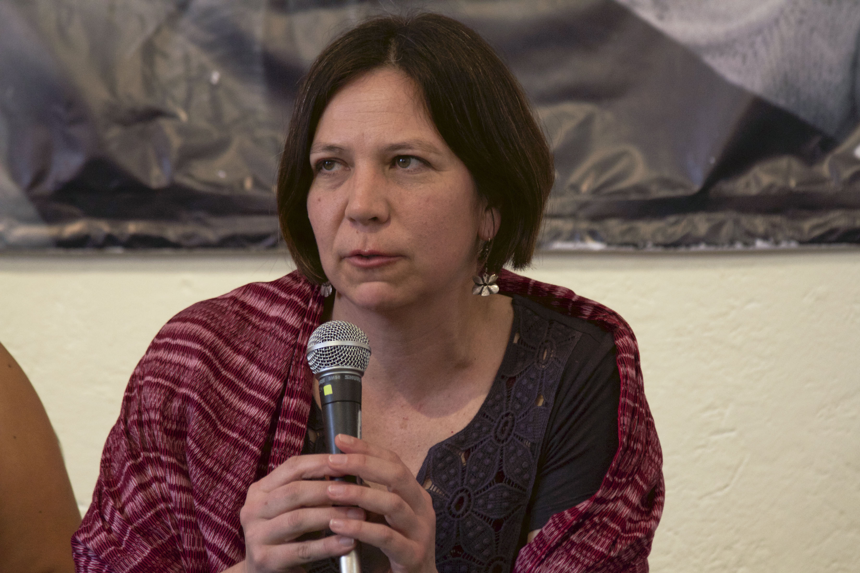 Jueves 8 de septiembre de 2016. En el Museo Archivo de la Fotografía, Marcia Tambutti Allende, documentalista y nieta de Salvador Allende, acompañada de Hugo Villa, Director de la Comisión de Filmaciones CDMX; Claudia Barattini, agregada audiovisual de la Embajada de Chile en México y Martha Orozco, productora; presentaron el documental Allende, mi abuelo Allende. Fotografía: Milton Martínez / Secretaría de Cultura CDMX